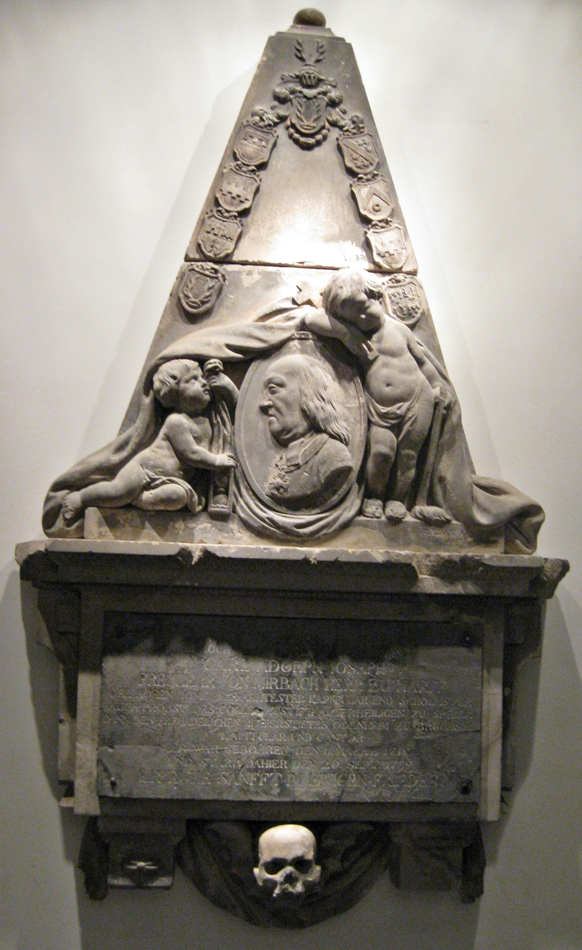 Epitaph des Speyerer Domherrn Karl Joseph von Mirbach (1718-1798), Vinzentiushaus Bruchsal (ehemals Stadtkirche Bruchsal)